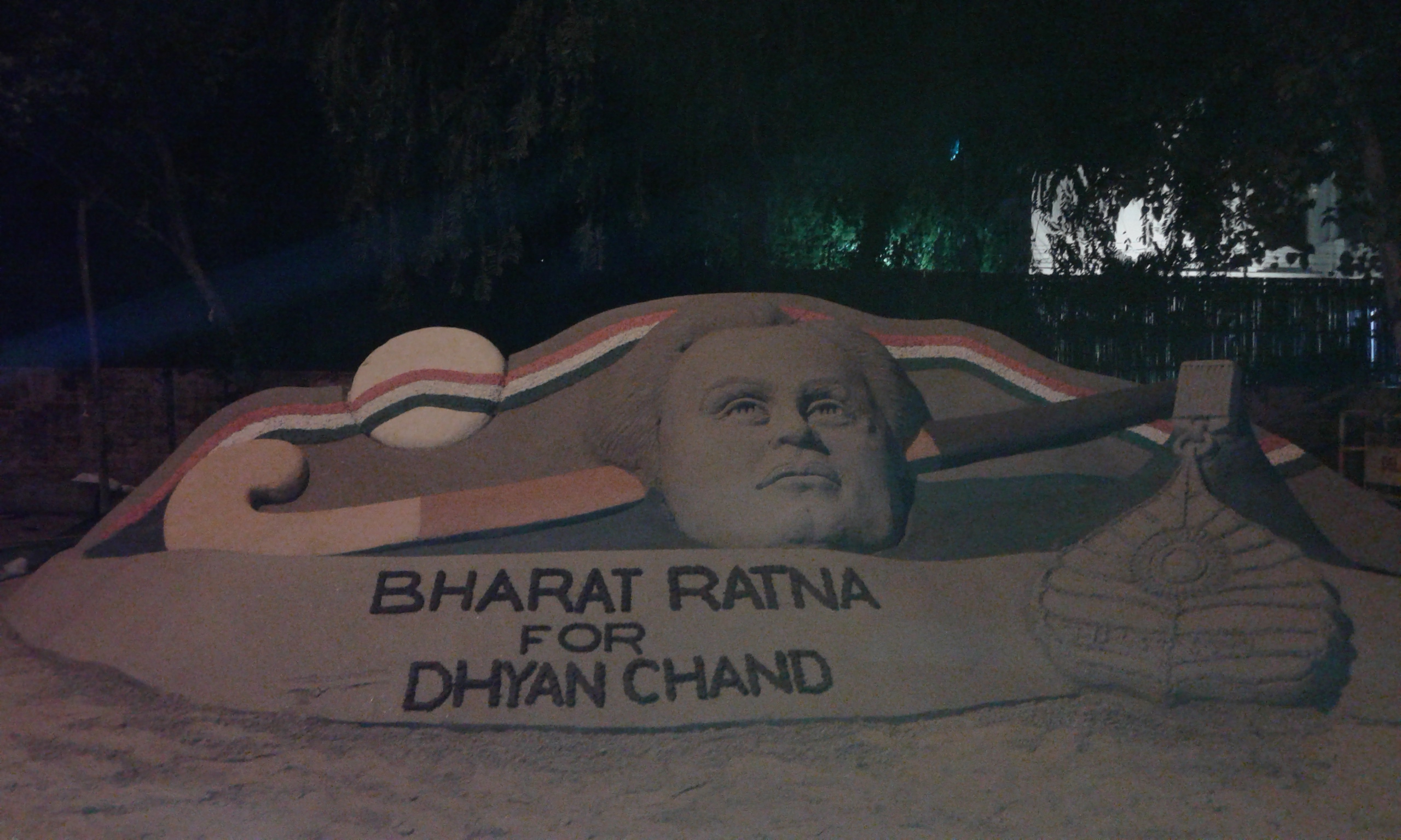 ഹോക്കി ഇതിഹാസം ധ്യാന്‍ ചന്ദിന് ഭാരത് രത്‌ന നല്‍കണമെന്ന് ആവശ്യപ്പെട്ടുള്ള പ്രതിഷേധത്തിന്റെ ഭാഗമായി ഡല്‍ഹിയിലെ ജന്തര്‍ മന്തറില്‍ തീര്‍ത്ത മണല്‍ ശില്‍പം..2016